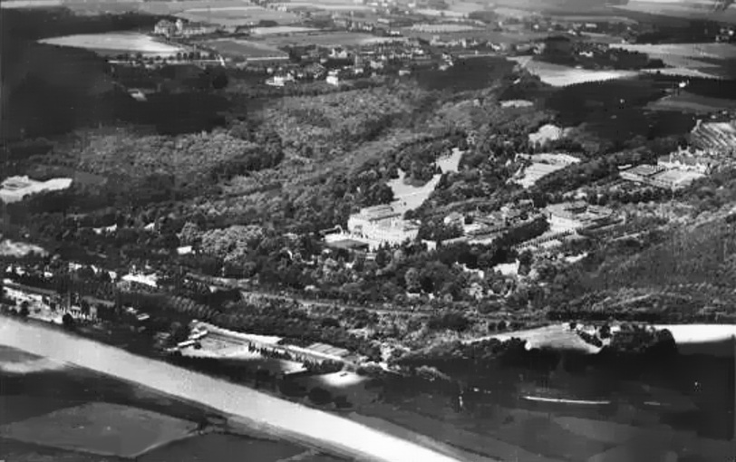 Ruhrtal bei Hügel, eine Fliegeraufnahme vor der Existenz des Baldeneysees